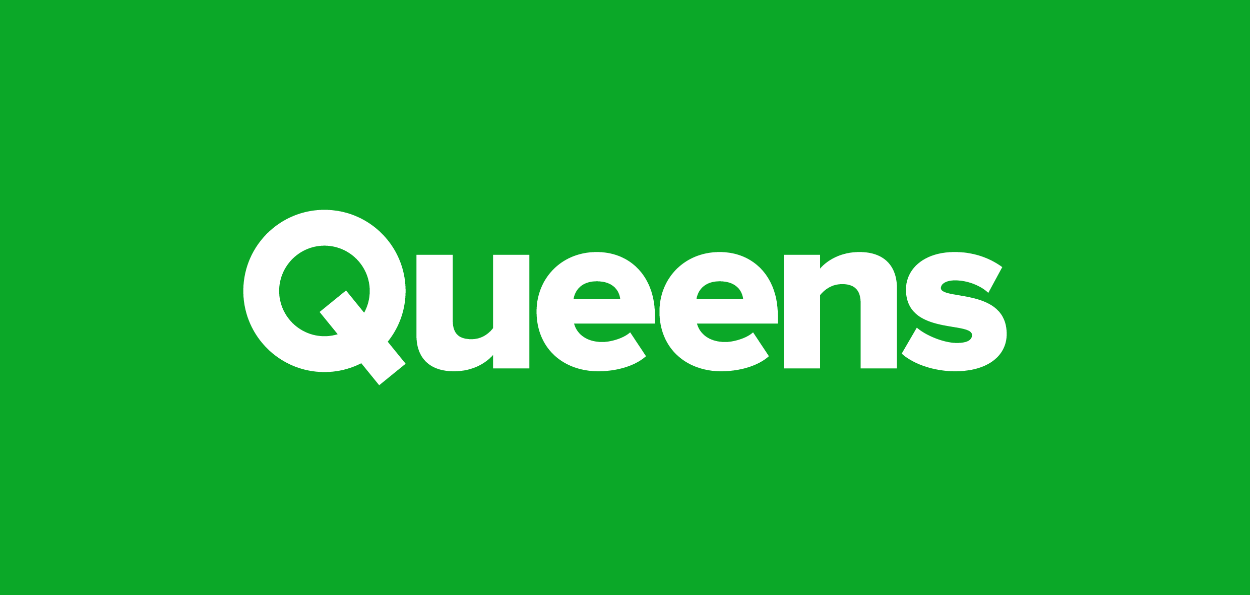 Queens logo